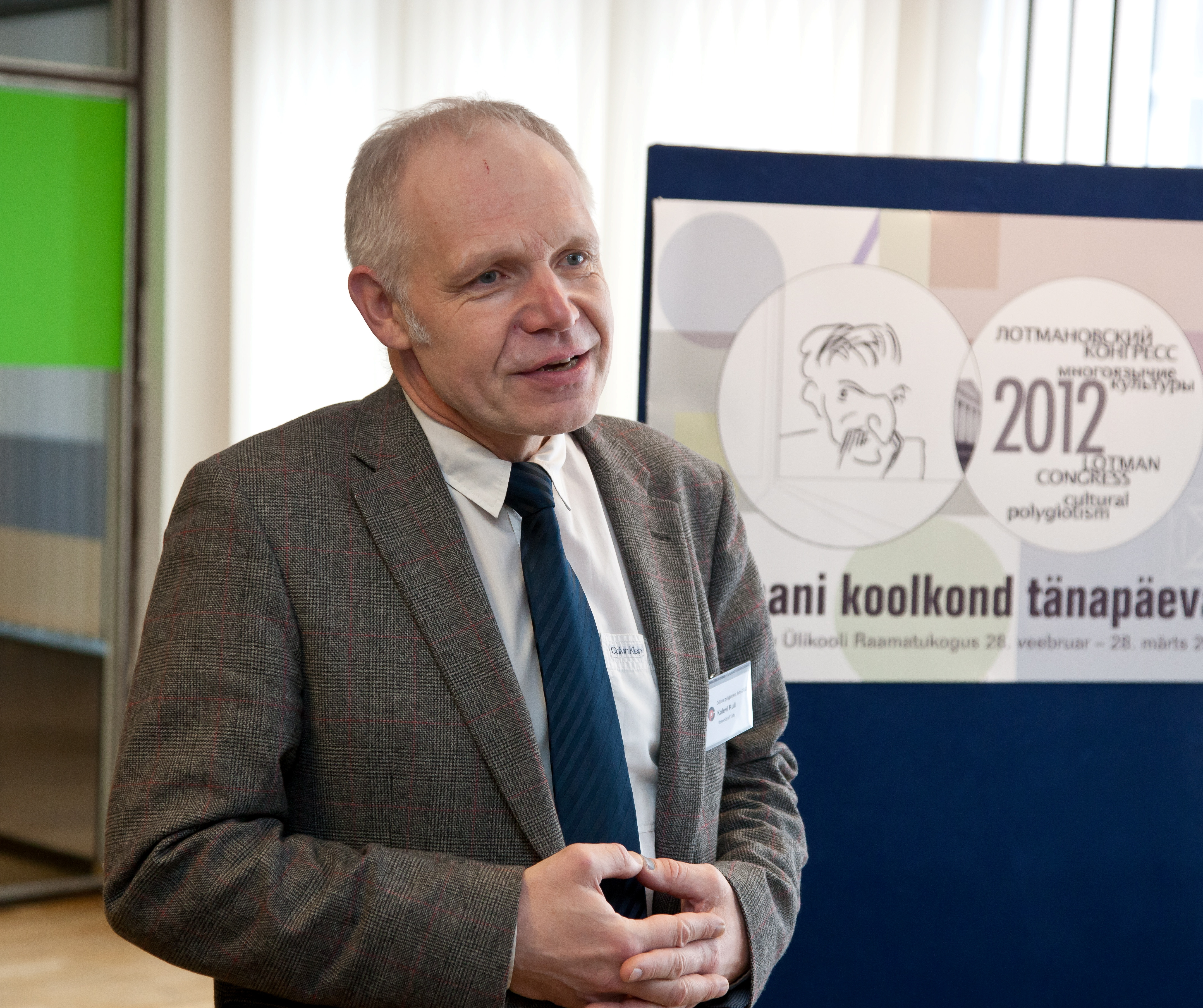 Tartu Ülikooli semiootika osakonna juhataja, biosemiootika professor Kalevi Kull näituse "Lotmani koolkond tänapäeval" avamisel TÜ raamatukogus 28. veebruaril 2012.